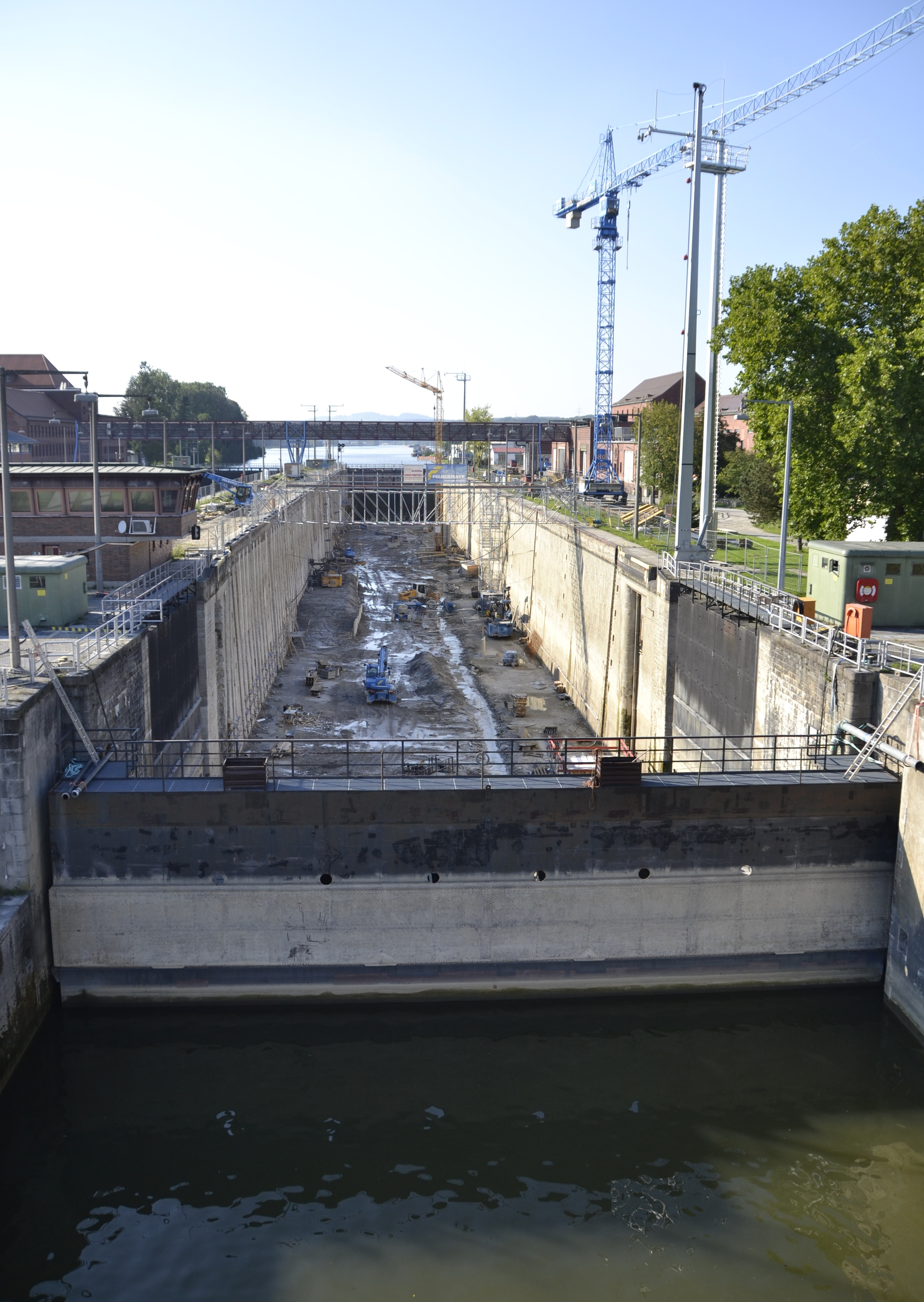 Baustelle in der Schleuse des Kraftwerks Kachlet in Passau.